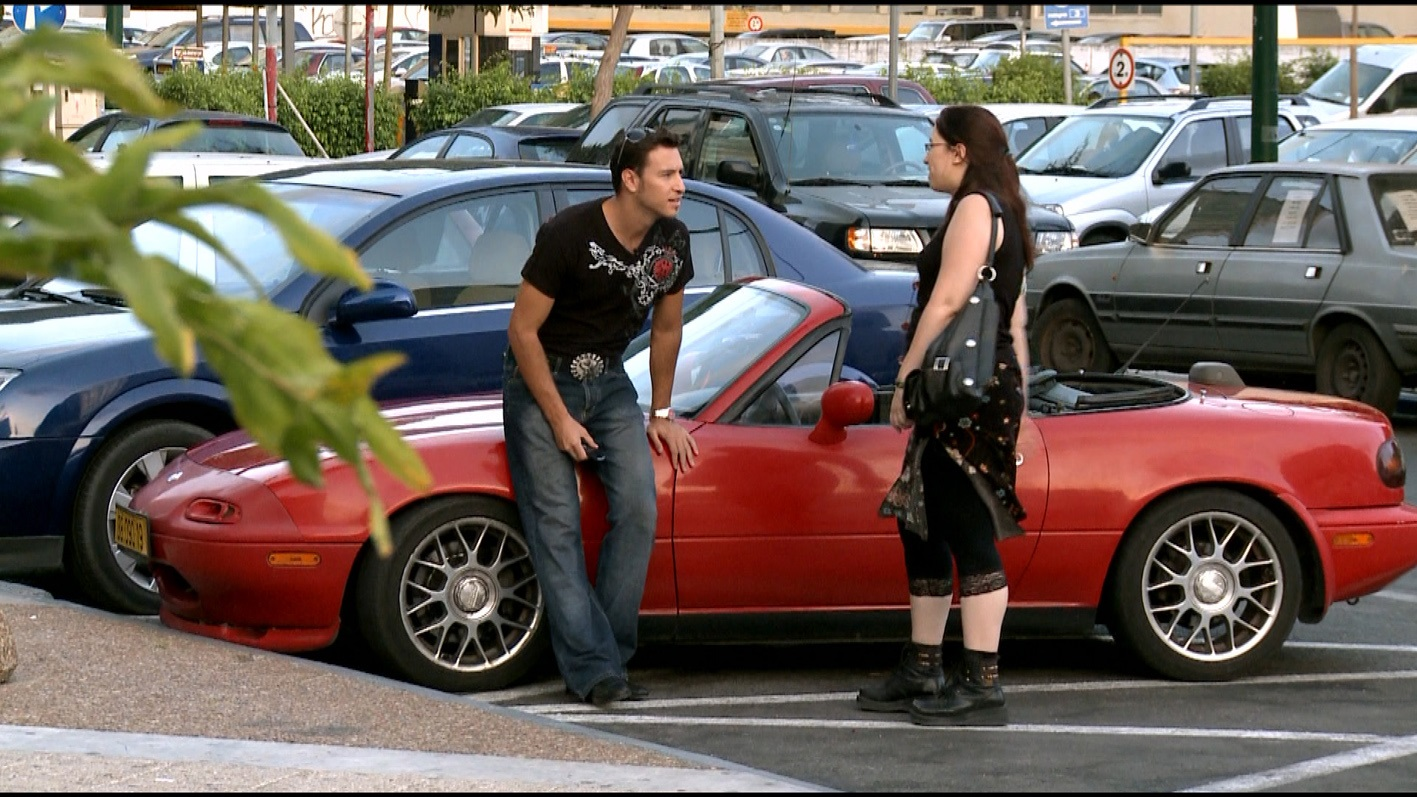 מתוך סרטה של טליה פינקל "טליה.דייט.קום", 2011